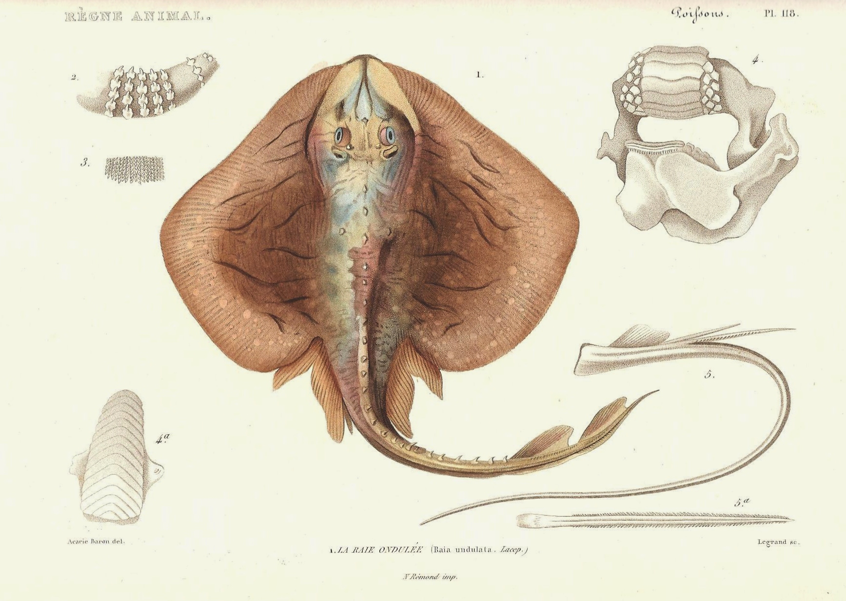 Planche N° 118 du livre "Le règne animal distribué d'après son organisation" par Georges Cuvier (Tome 8), seconde édition de 1828, représentant la raie ondulée : Raia ondulata.